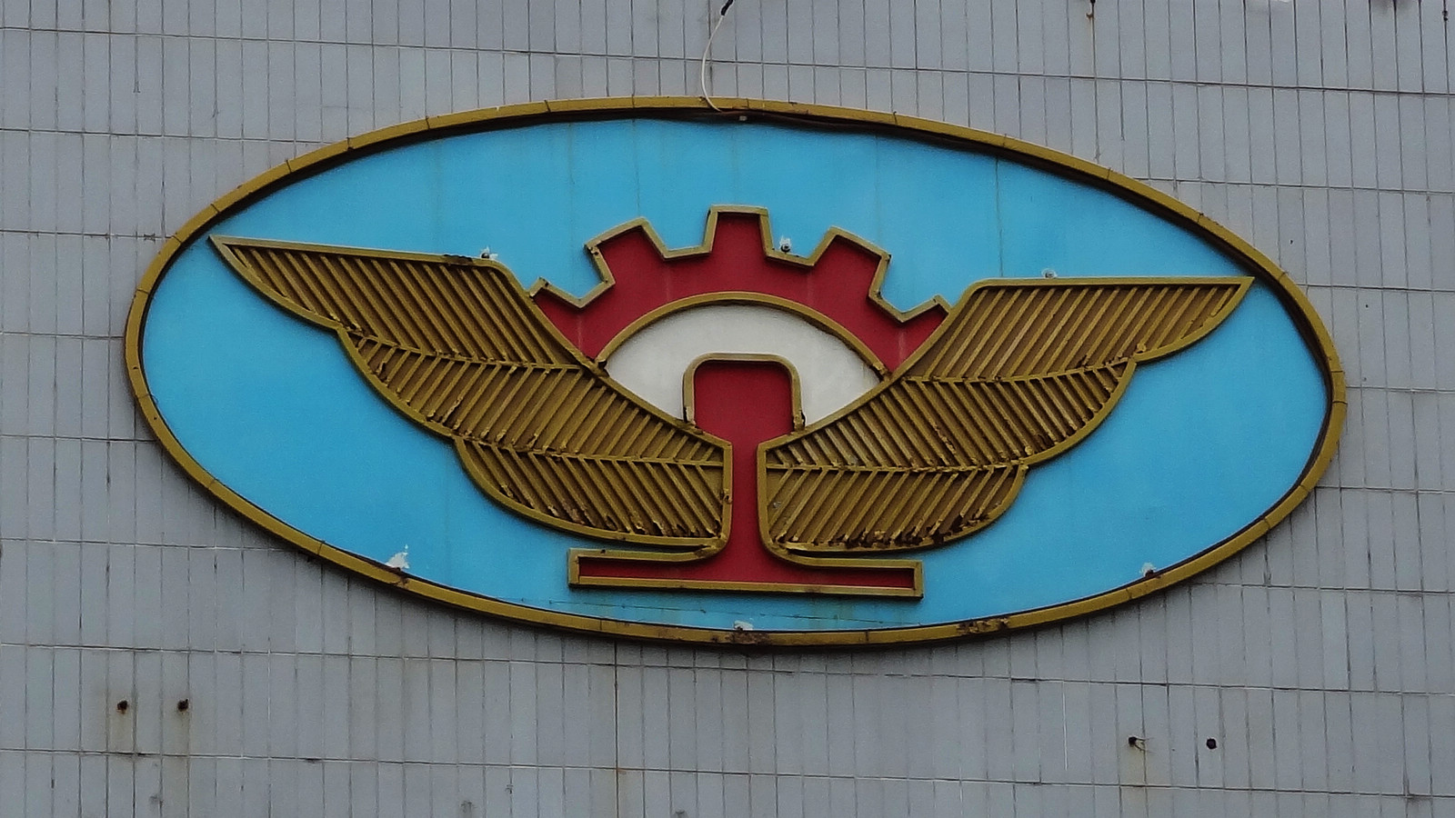 The logo of Vietnam Railways at Da Nang Railway Station